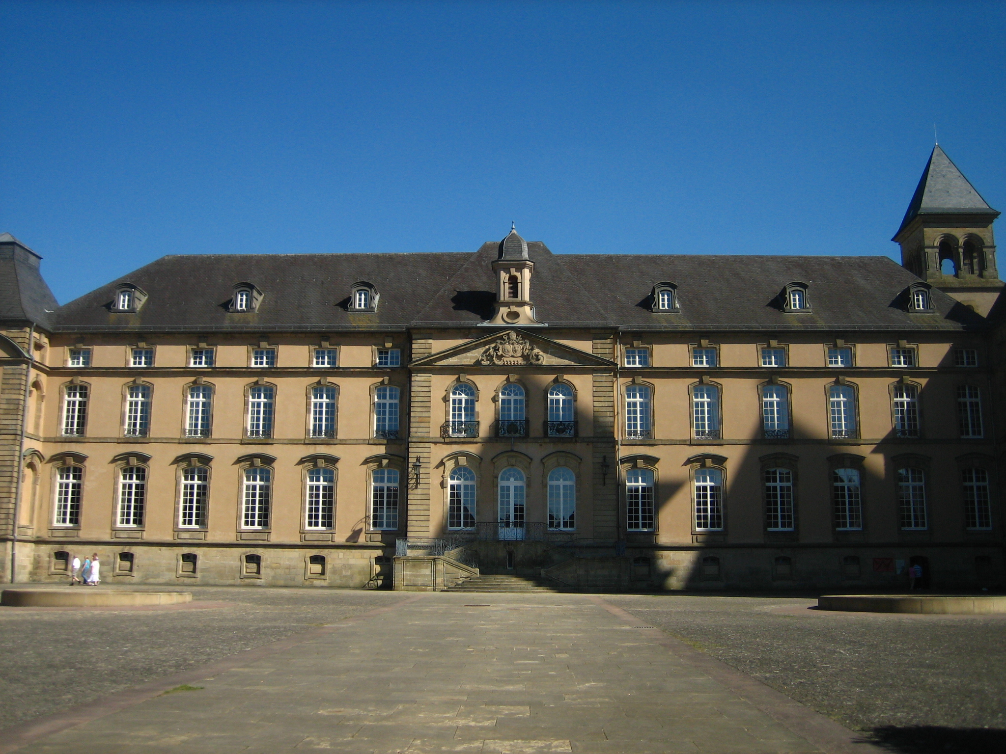 De Lycée classique d'Echternach (08-2009. Kategorie:Gemeng Iechternach Kategorie:Schoulen zu Lëtzebuerg